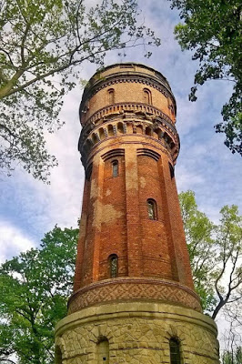 Wieża Ciśnień w Rybniku